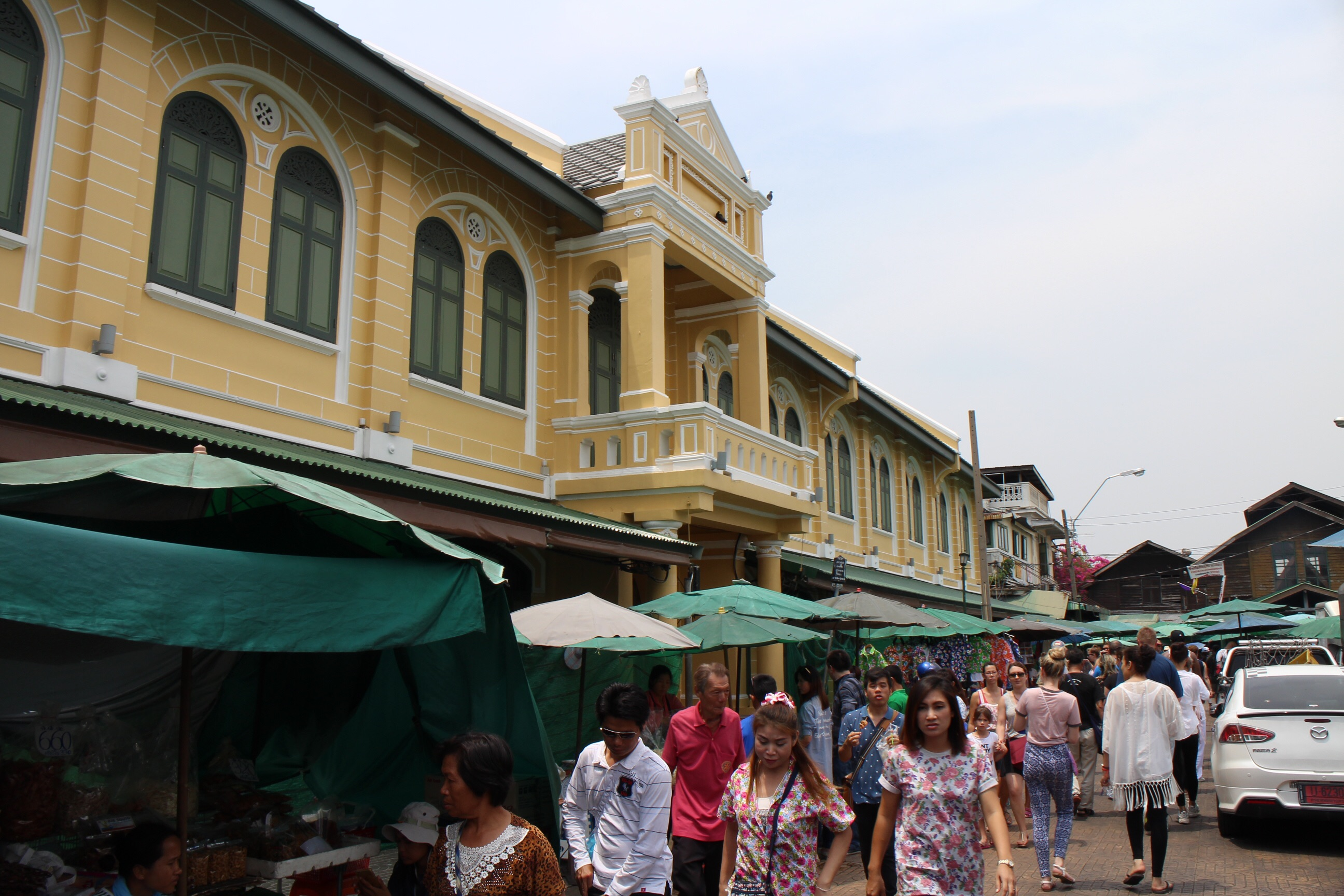 Phra Borom Maha Ratchawang, Phra Nakhon, Bangkok, Thailand